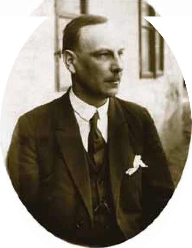 Jindřich Valášek, český fotbalista